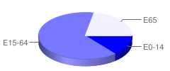 suddivisione abitanti per età